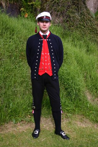 Student, Faroe Islands